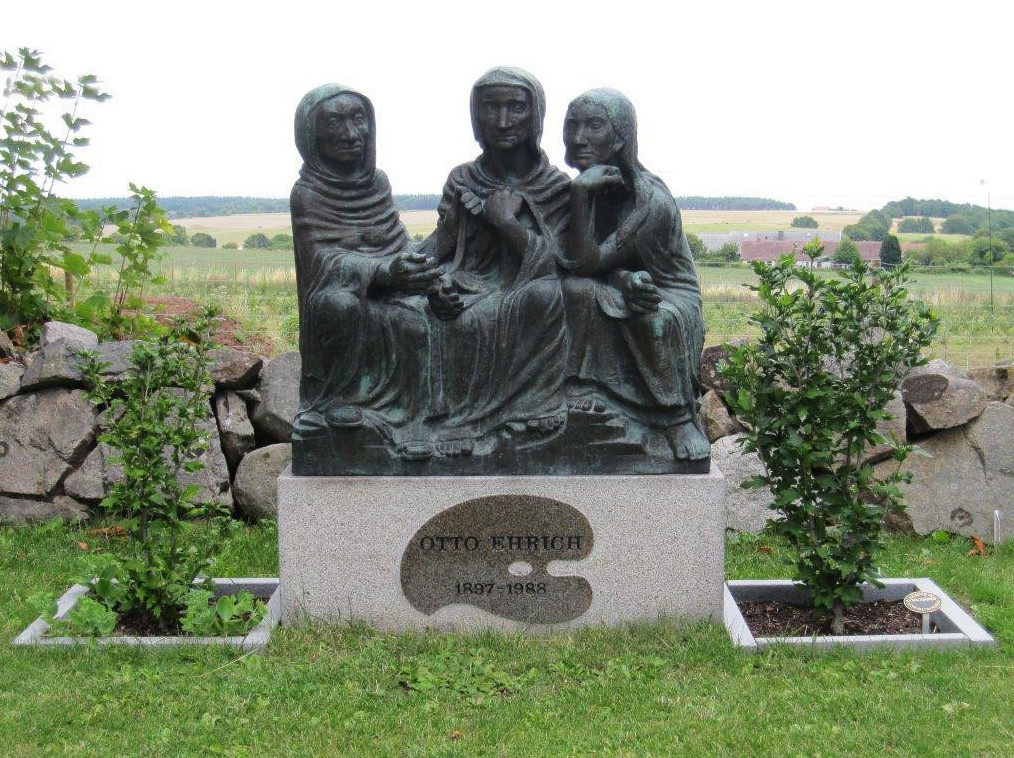 Urd, Verdandi och Skuld, mer kända som "Nornorna", skapad av bildhuggaren Waldemar Raemisch